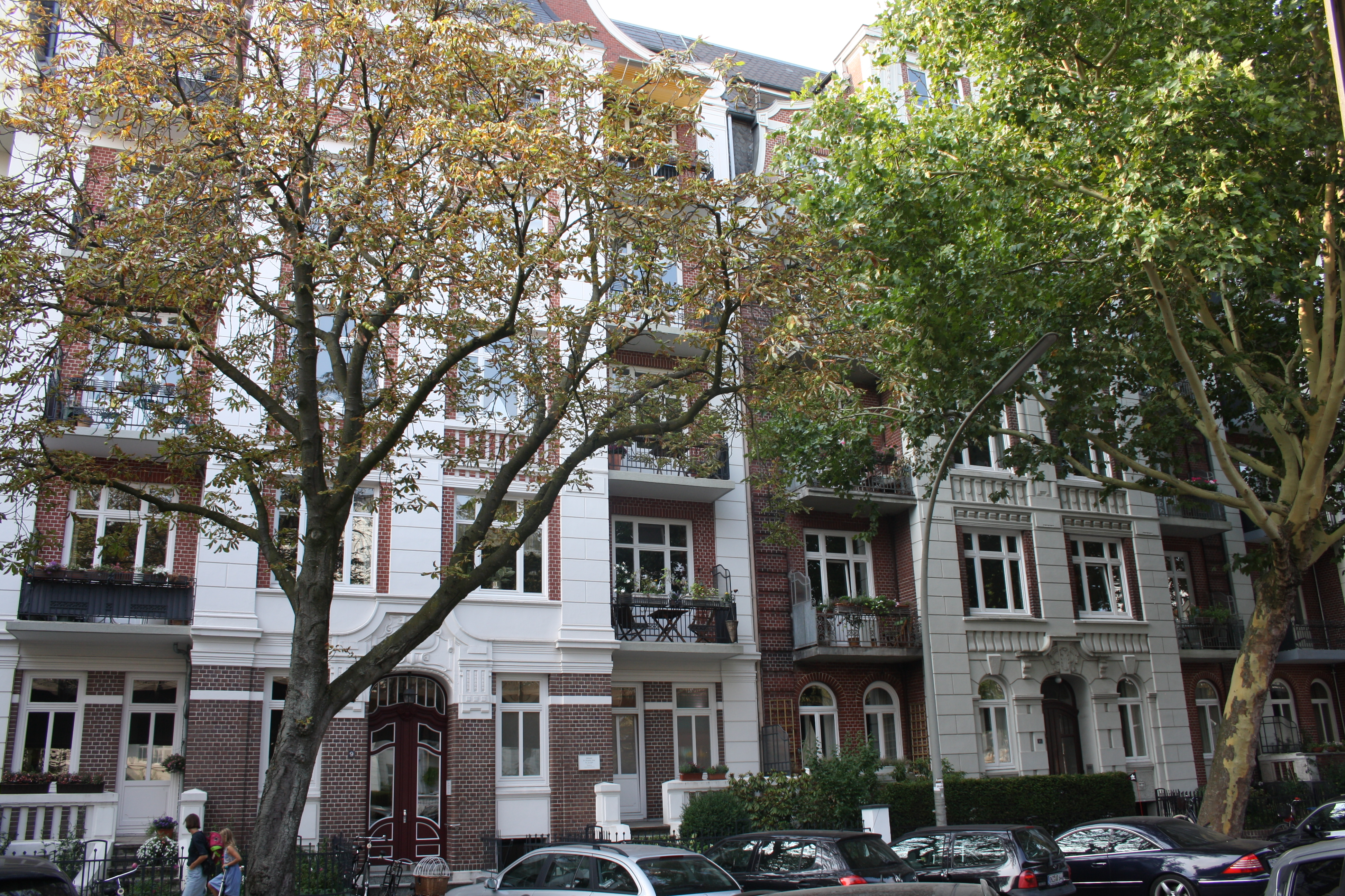 Wohnhaus in der Isestraße in Hamburg-Harvestehude